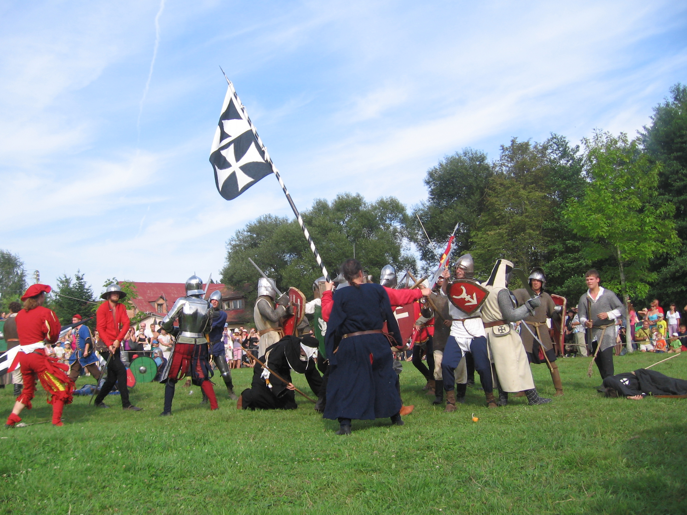 Беларуская (тарашкевіца): Дудуткi, Грунвальд-600. Рэканструкцыя бiтвы